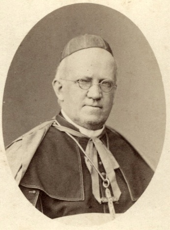 Joseph Feßler, Bischof von St. Pölten (Original rückseitig beschriftet)